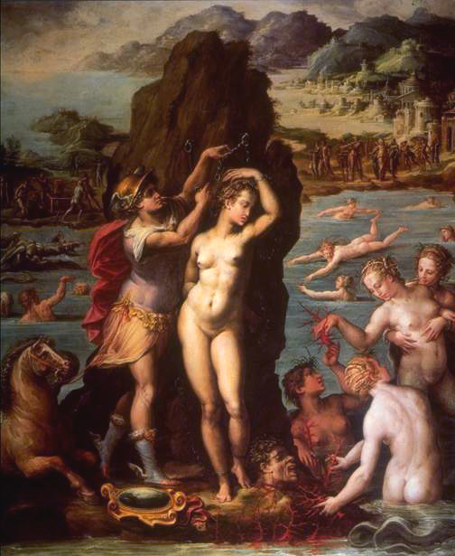 Giorgio Vasari, Perseus en Andromeda, 1570, Olieverf op paneel, 127x109 cm, Palazzo Vecchio, Florence